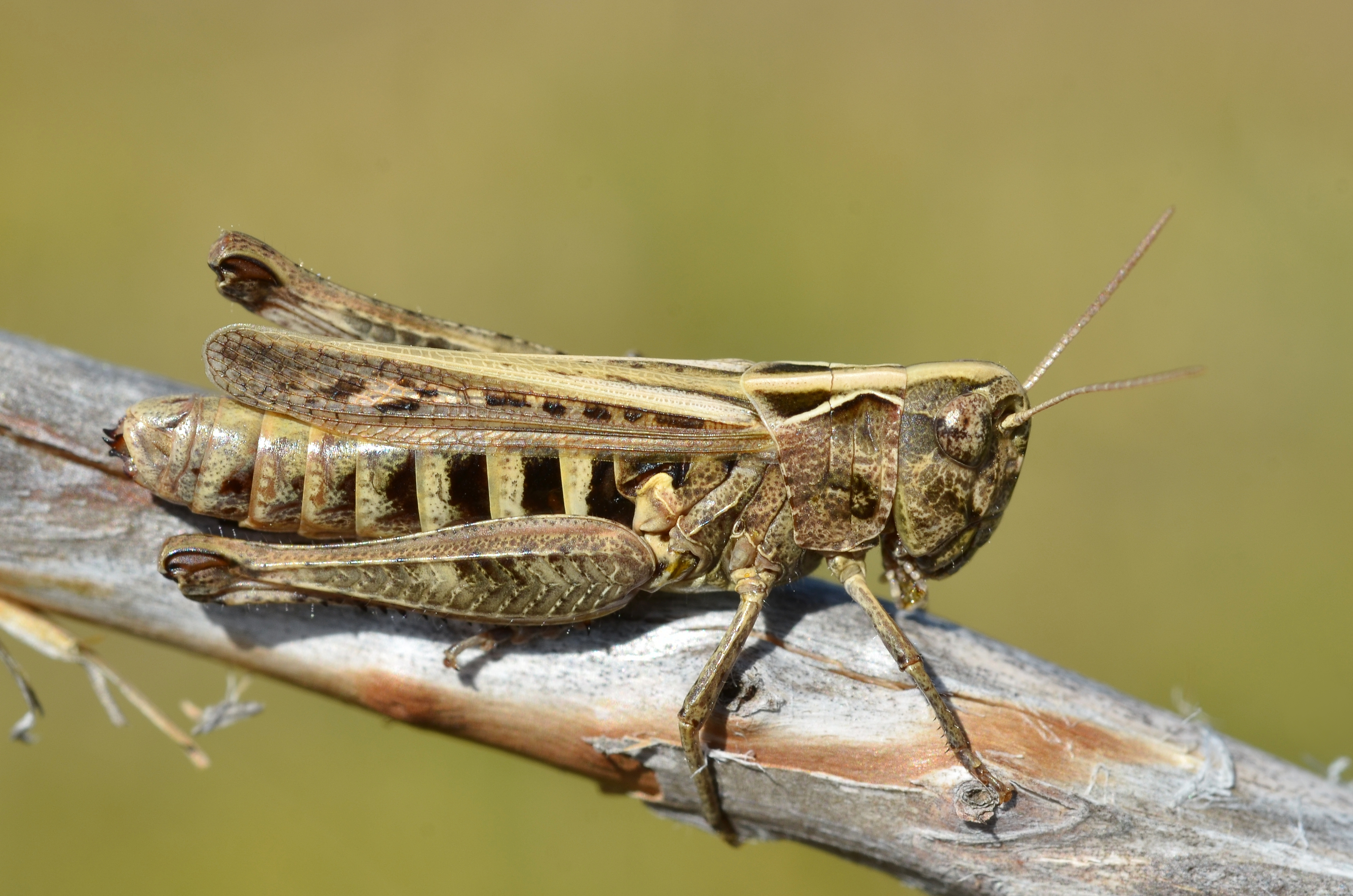 Omocestus haemorrhoidalis female